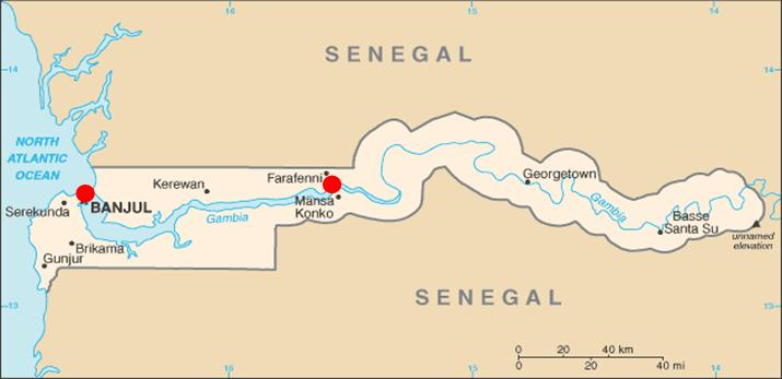 Traversée de la Gambie (bacs)